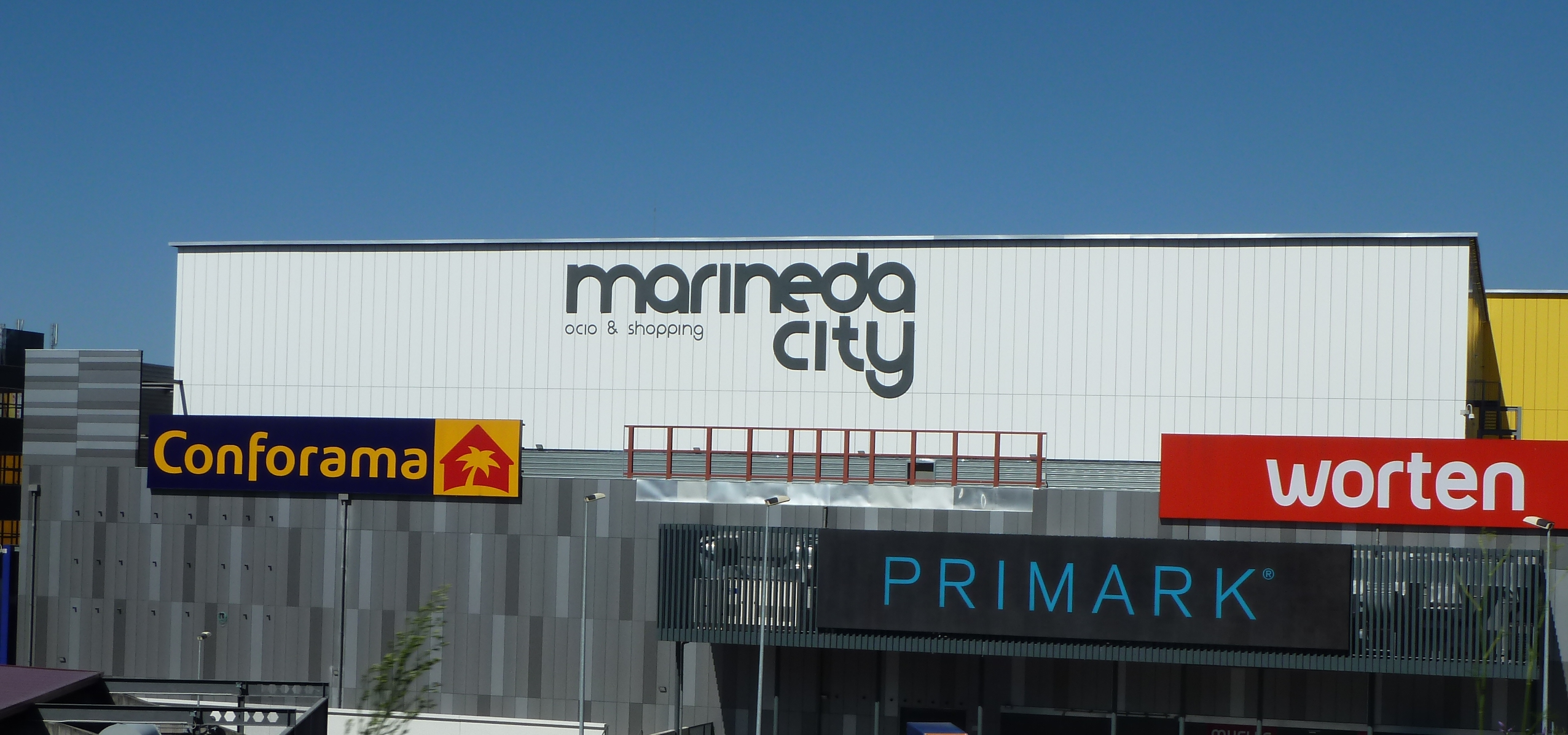 Lateral do centro comercial Marineda City na cidade da Coruña.